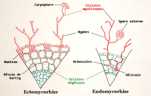 Dessin d'une coupe de racine mycorrhizée réalisé par mes soins en m'inspirant d'articles publiés dans des revues scientifiques (notamment un article de Furlan dont j'ai malheureusement perdu les références depuis)